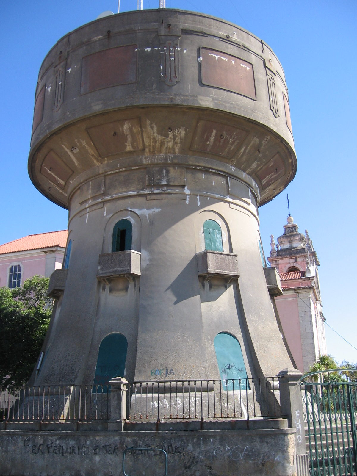 Depósito EPAL, Penha de França, Lisboa, Portugal